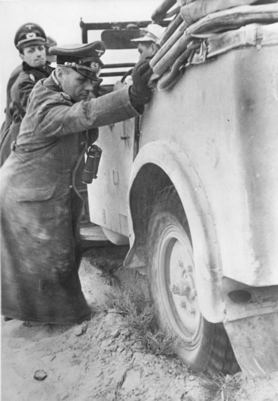 Der Generaloberst packt mit an. Der Wagen des Generaloberst Rommel war im Wüstensand stecken geblieben, nun packt er selbst mit an, um seinen Wagen wieder flott zu bekommen. Bei Abdruck nennen: Pk-Kriegsberichter Valtingojer [herausgegeben am 9.2.1941]